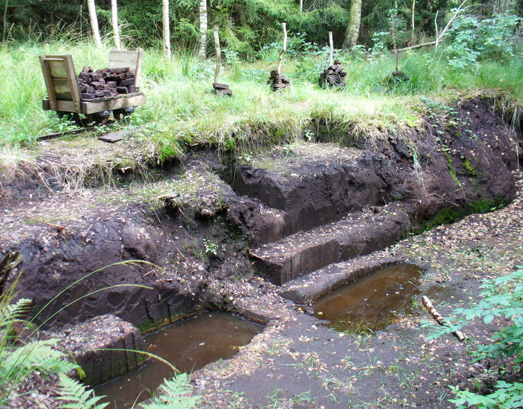 Historischer Torfstich - Torfabbau im Wurzacher Ried bis 1997 selbst fotografiert von User:enslin am Torfstecherweg 11.9.2005